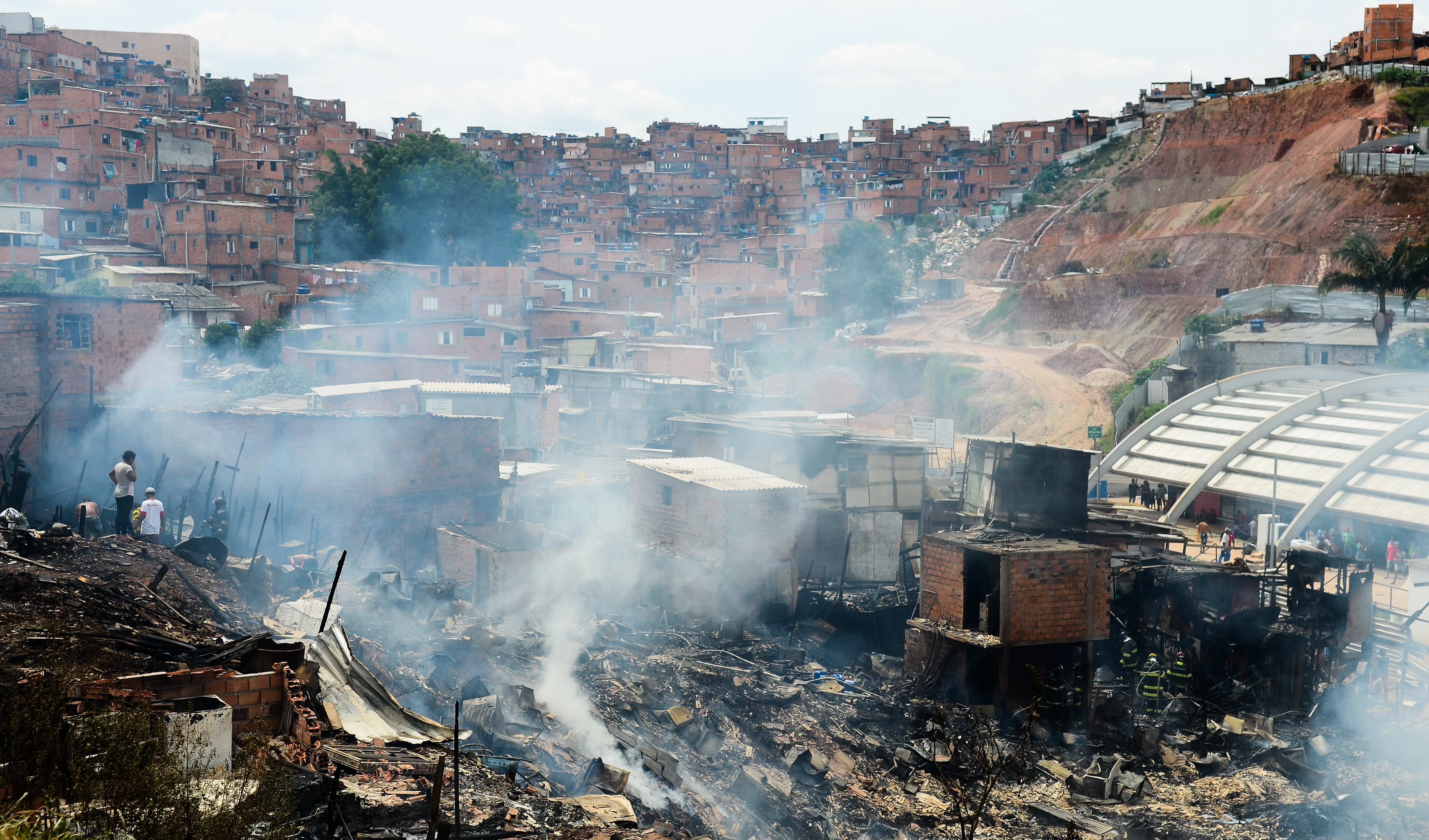 São Paulo - Trinta casas são destruídas durante novo incêndio na Favela de Paraisópolis. Esse é o segundo incêndio na comunidade em menos de dez dias (Rovena Rosa/Agência Brasil)